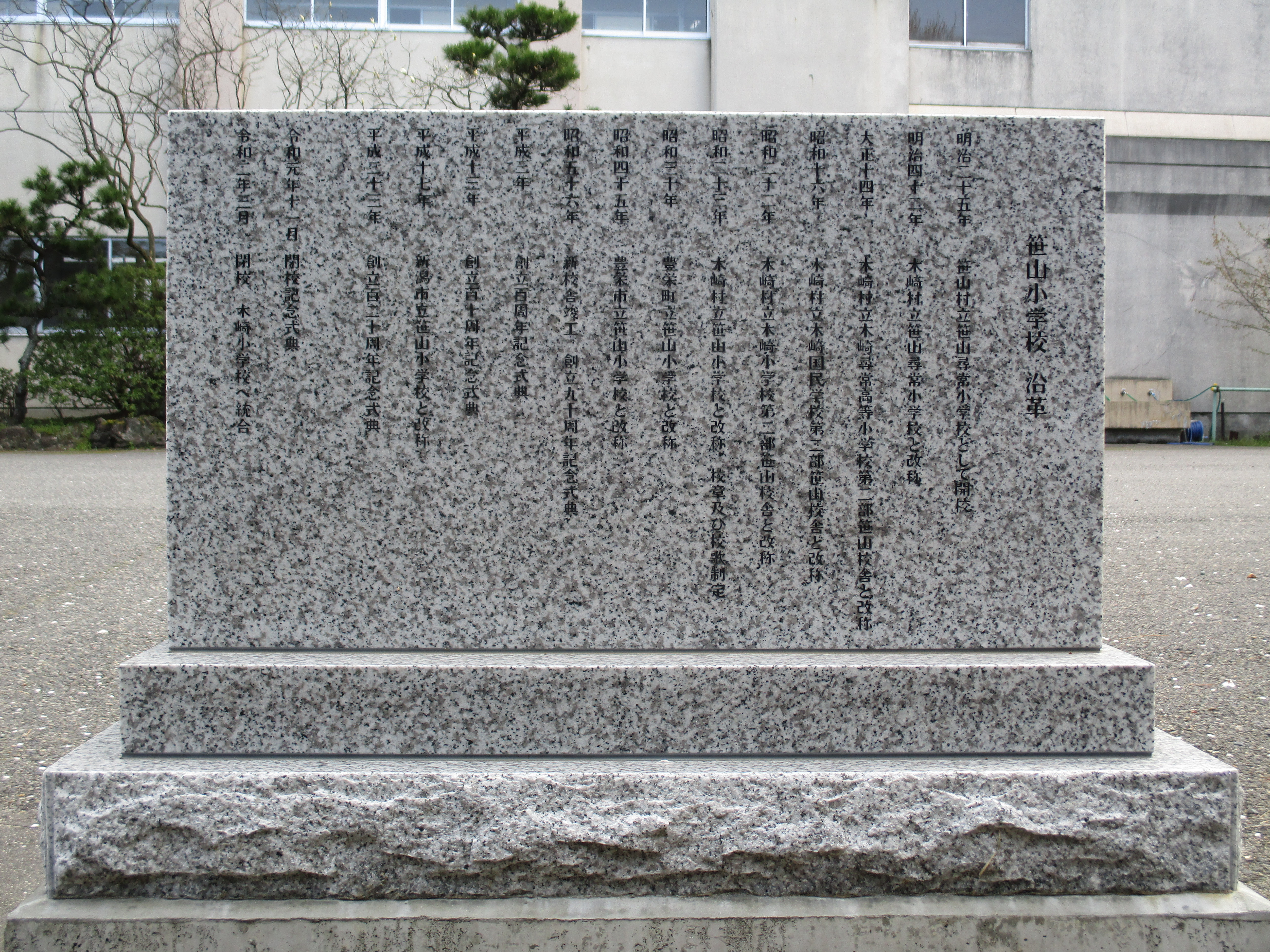 閉校記念碑 背面 - 新潟市立笹山小学校